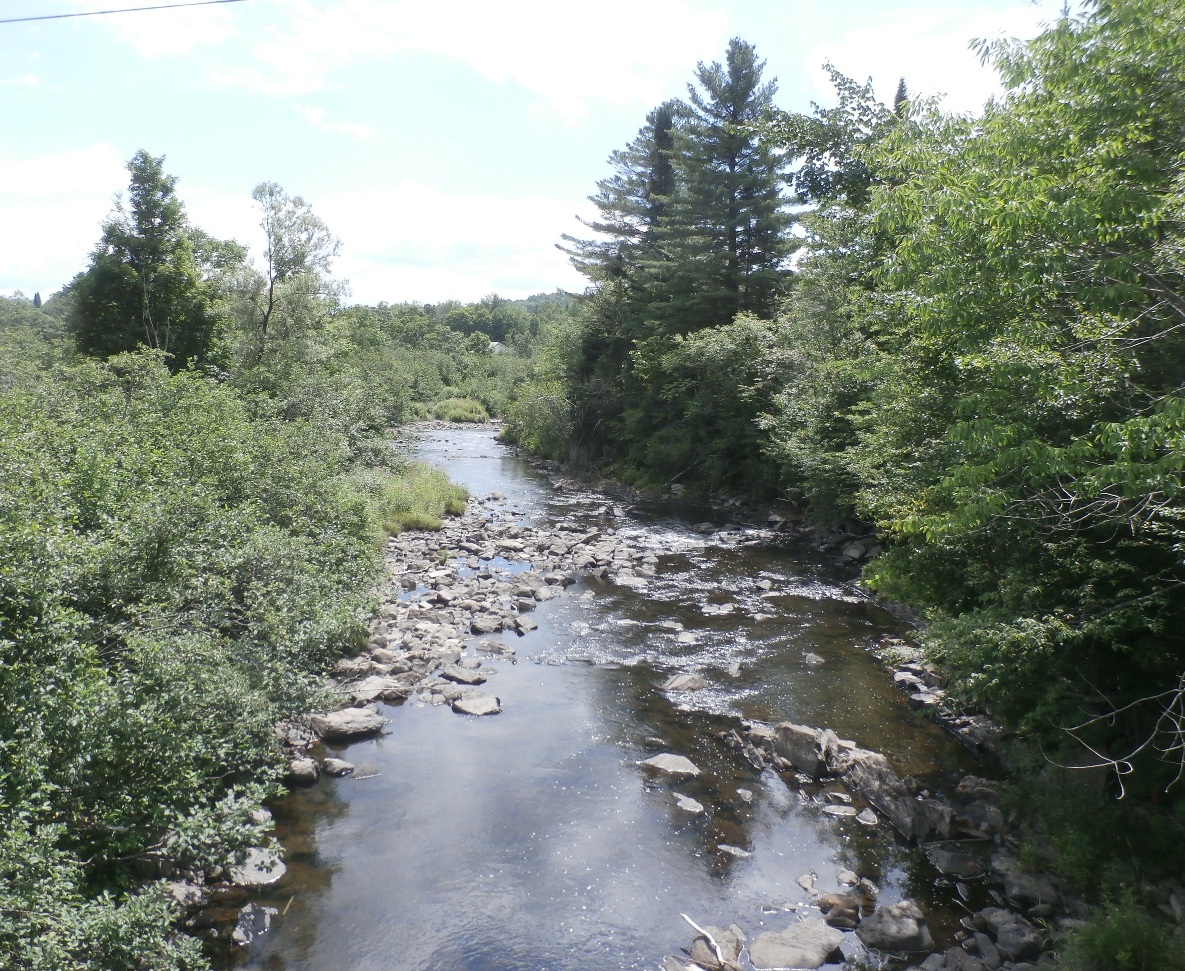 Rivière Missisquoi Nord en aval du chemin East River près de Bolton.